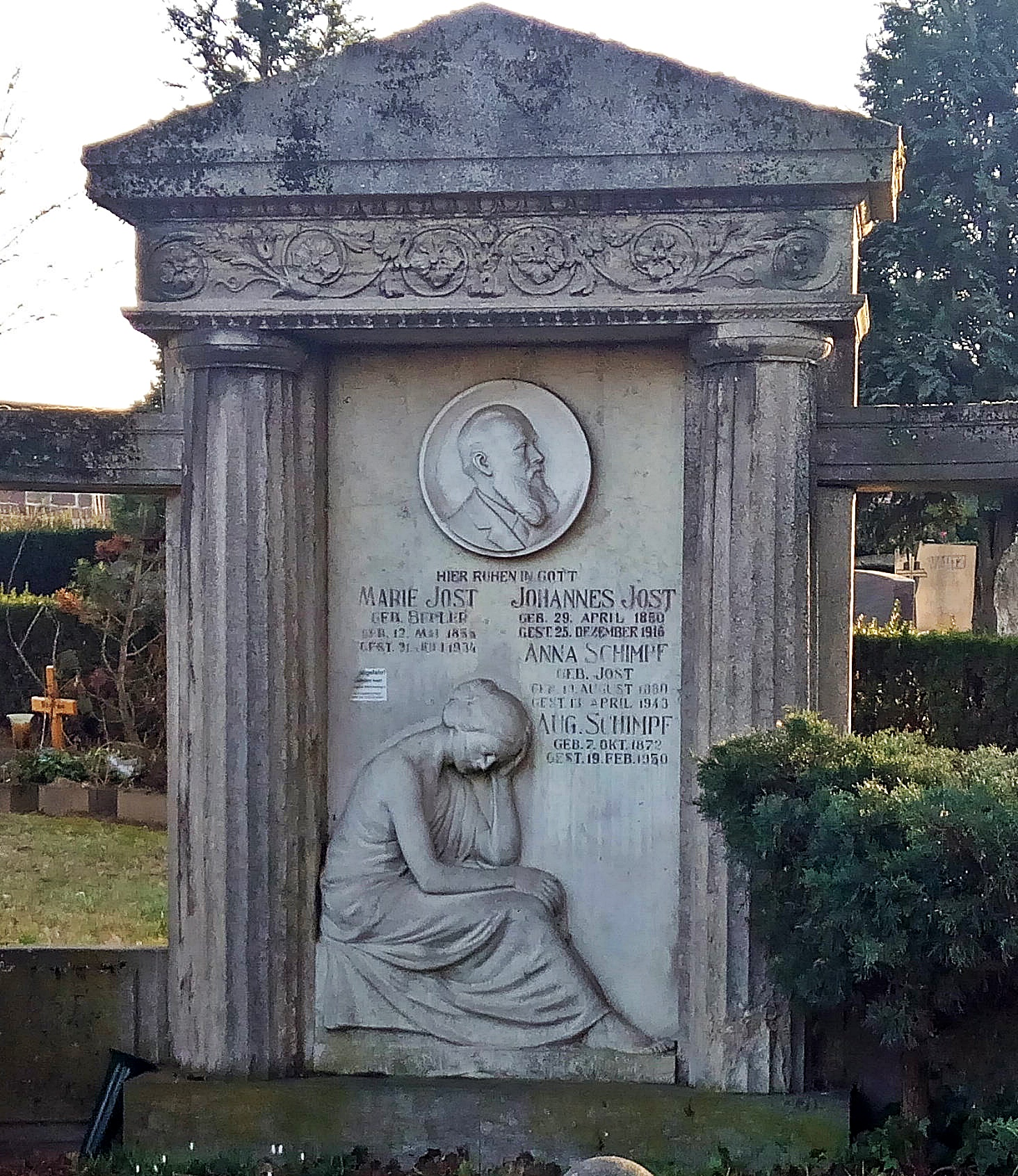 Johannes Jost (1850-1916), Brauereibesitzer, Grabstein, Friedhof Grünstadt